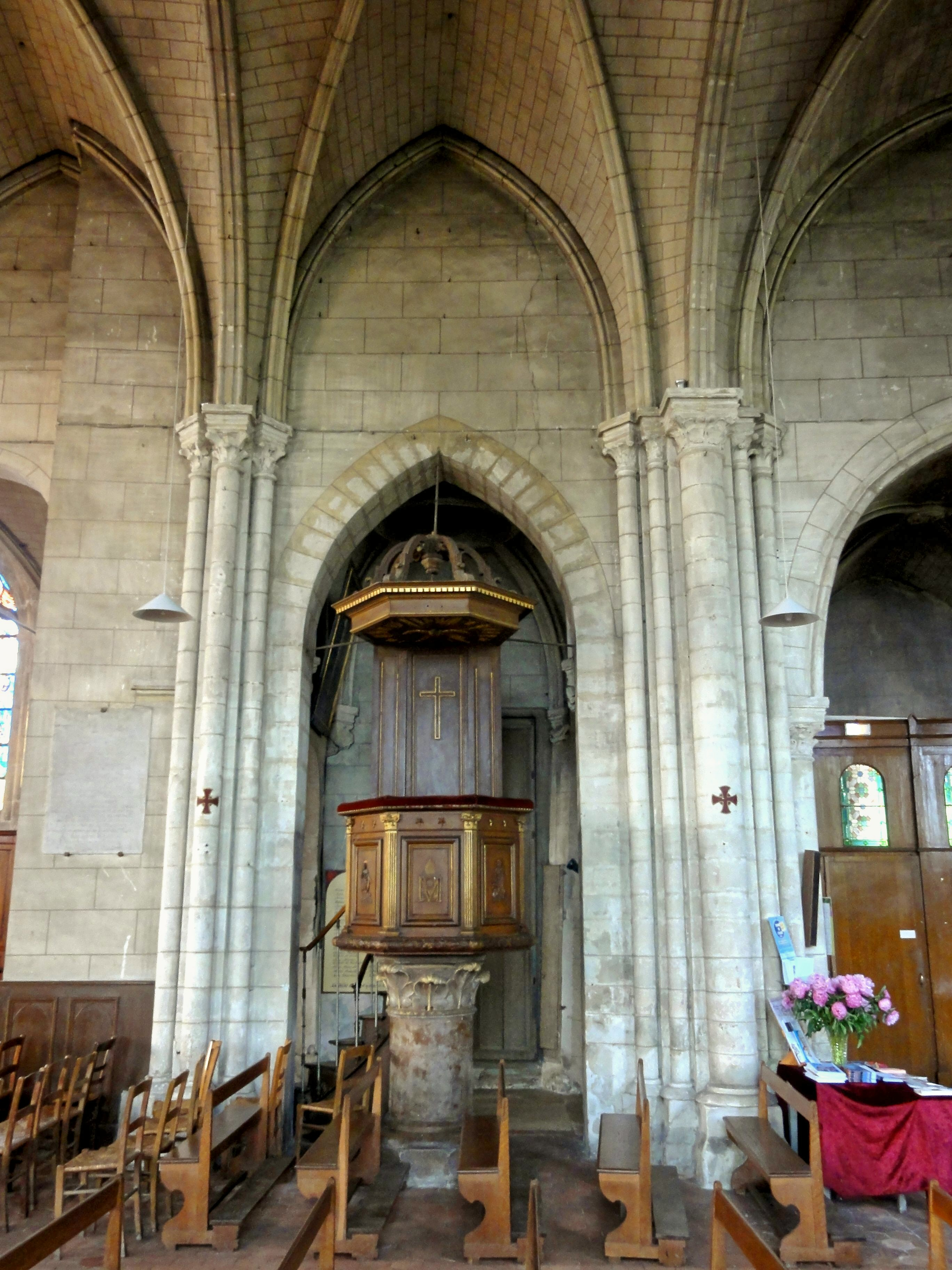 Quatrième travée de la nef, vue sur la base du clocher au sud.